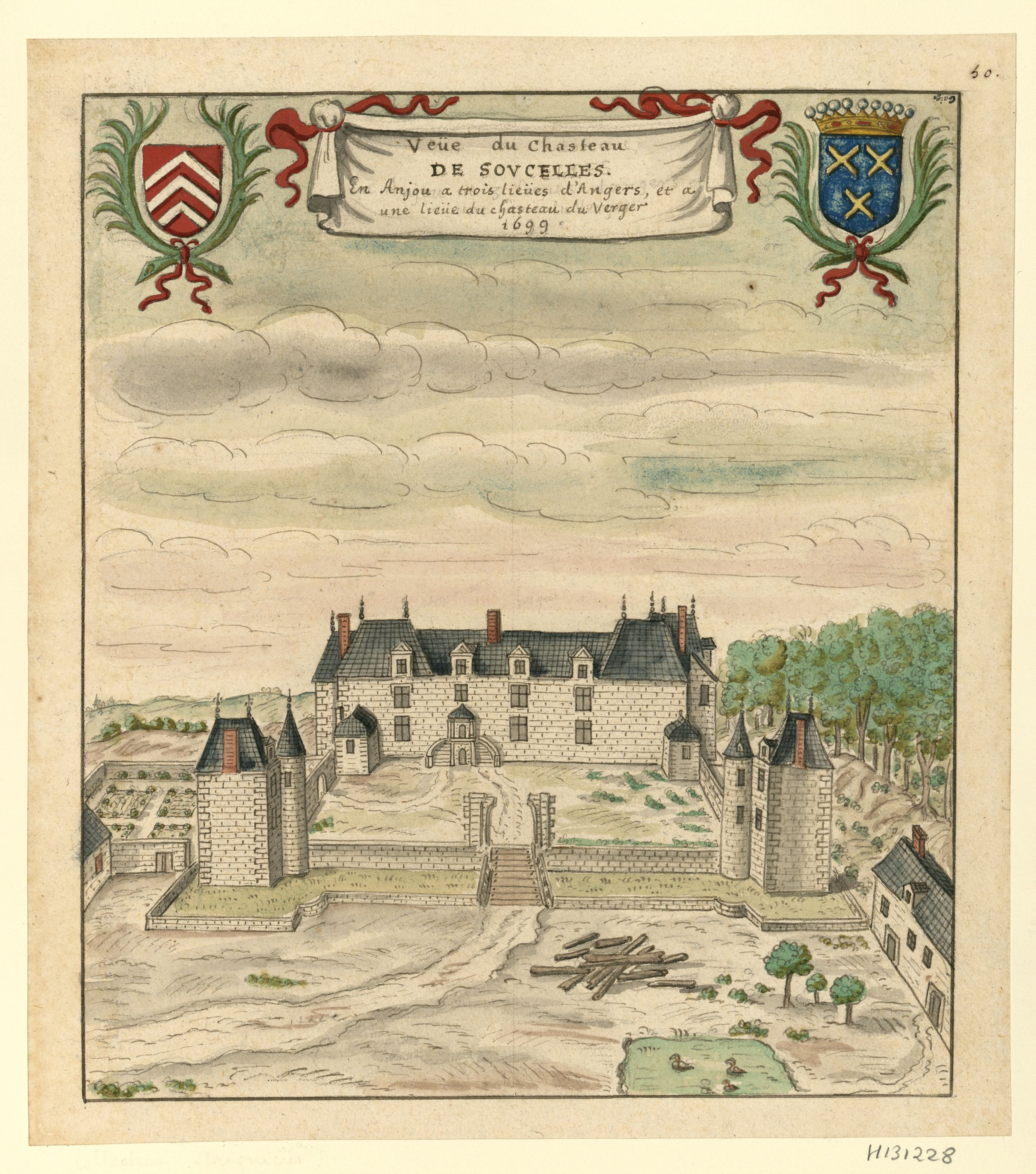 Veüe du chasteau de Soucelles. en Anjou a trois lieües d'Angers, et a une lieüe du chasteau du Verger // 1699 : [dessin] / [Louis Boudan]